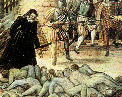 Le massacre de la Saint-Barthélemy. Peinture.